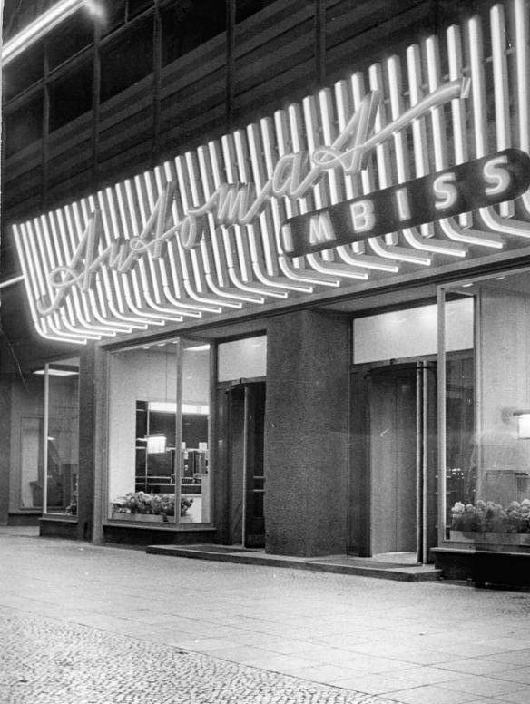 Berlin, Alexanderplatz, Automatenrestaurant, Nacht Zentralbild Funck Ra-Sch. 1 Motiv 3.7.1954 Automatenrestaurant am Alex Am Alexanderplatz, Berlin, wurde vor kurzem ein HO "Automat Imbiss" eröffnet. UBz: Der Automat Imbiss bei Nacht.